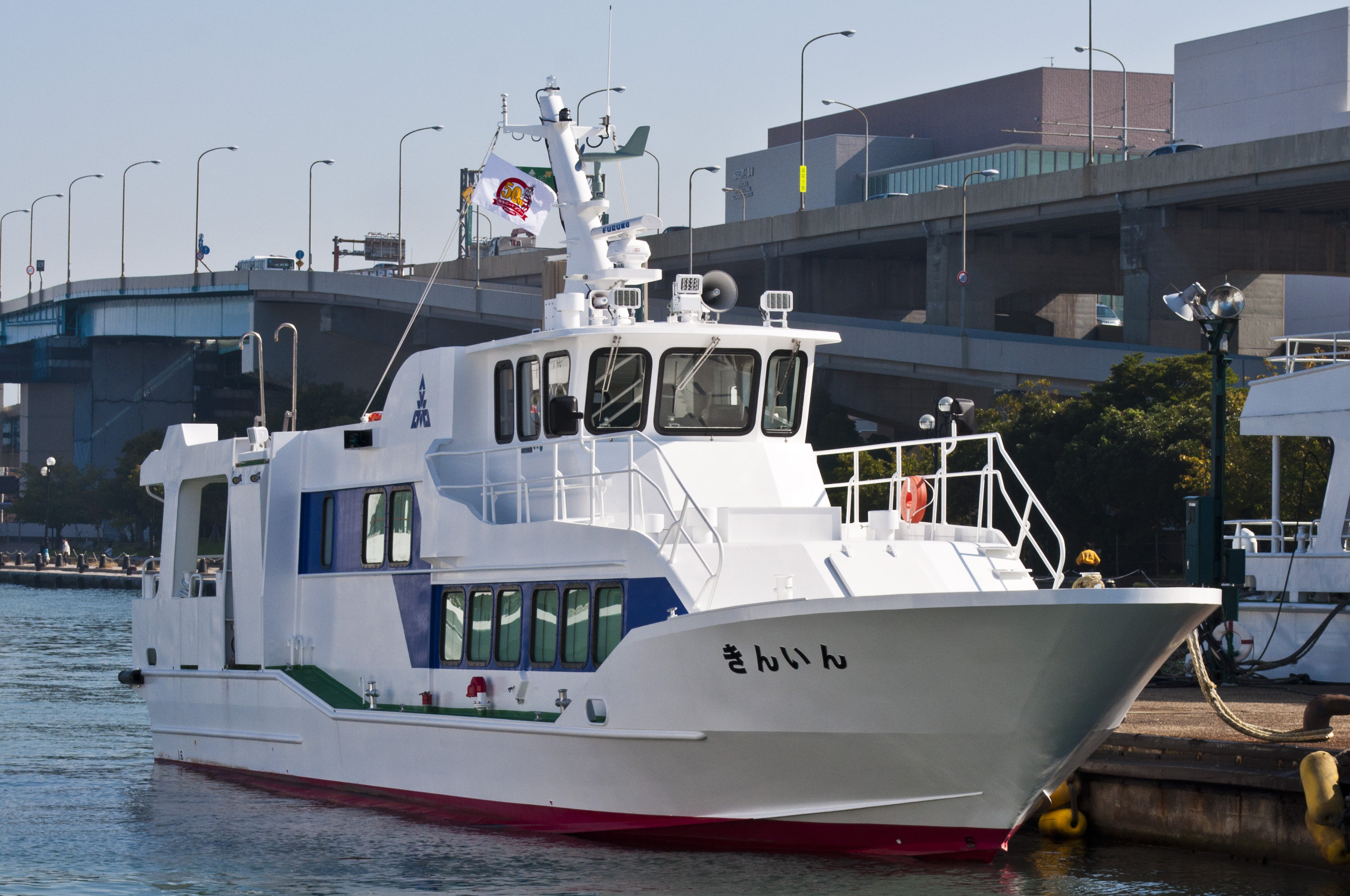 福岡市営渡船「きんいん」 博多ふ頭にて撮影